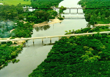 Foto aerea del parque del Río Olimar